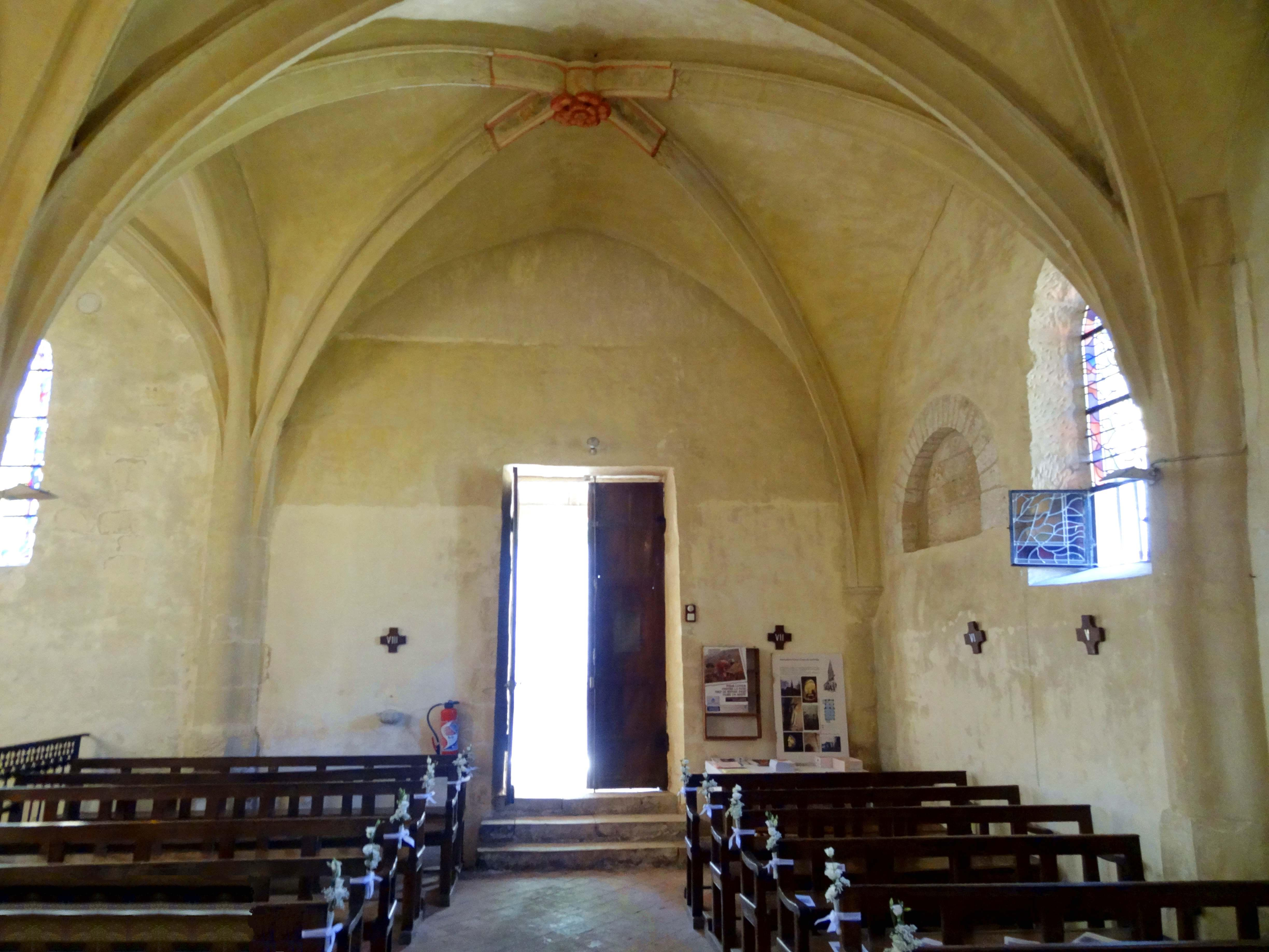 Intérieur de l'église - voir titre.